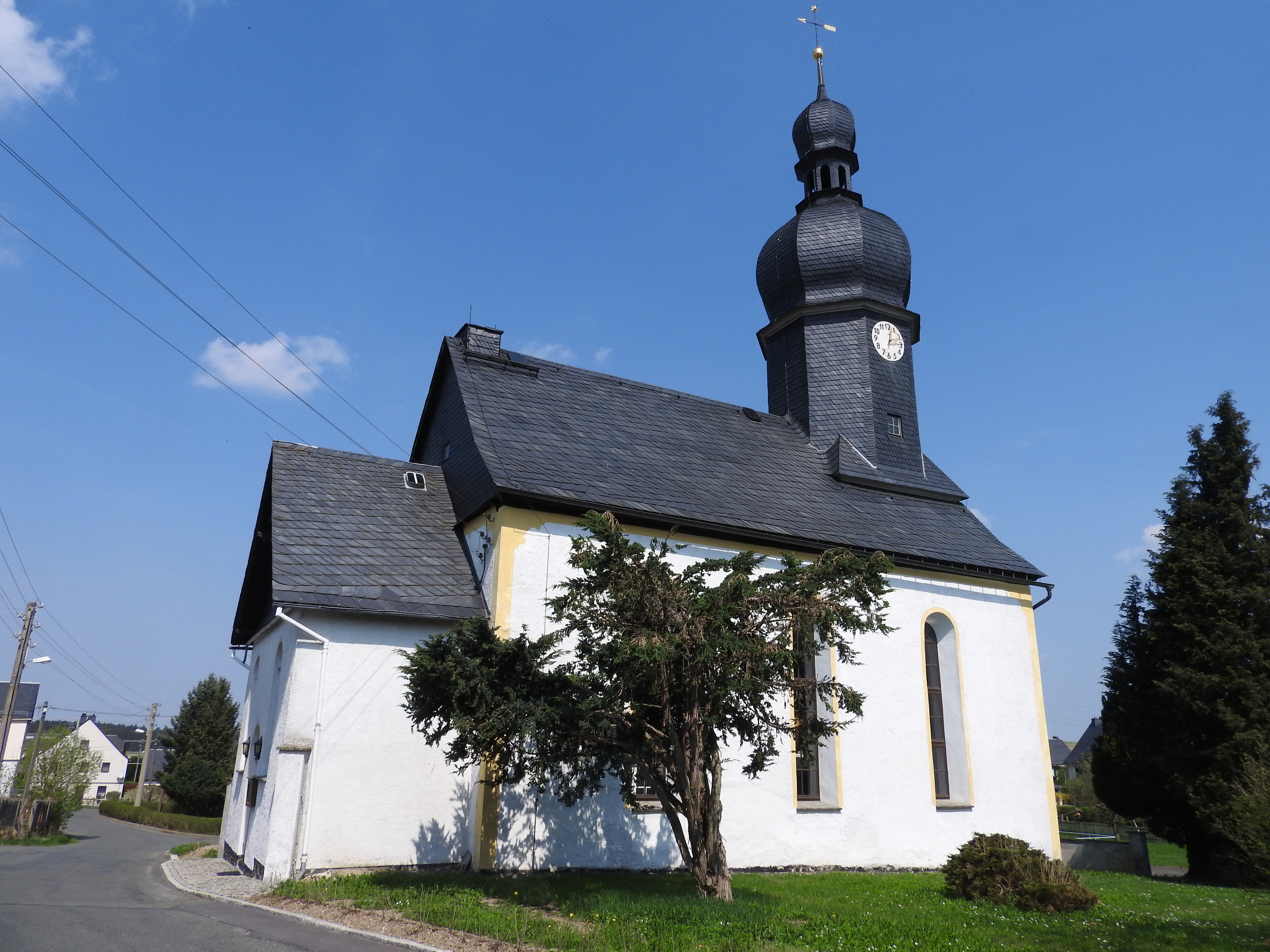 Kirche in Eliasbrunn, Remptendorf, Thüringen